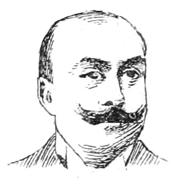 "La Nouvelle Chambre" : "Ruau".